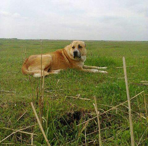 Qurdbasar